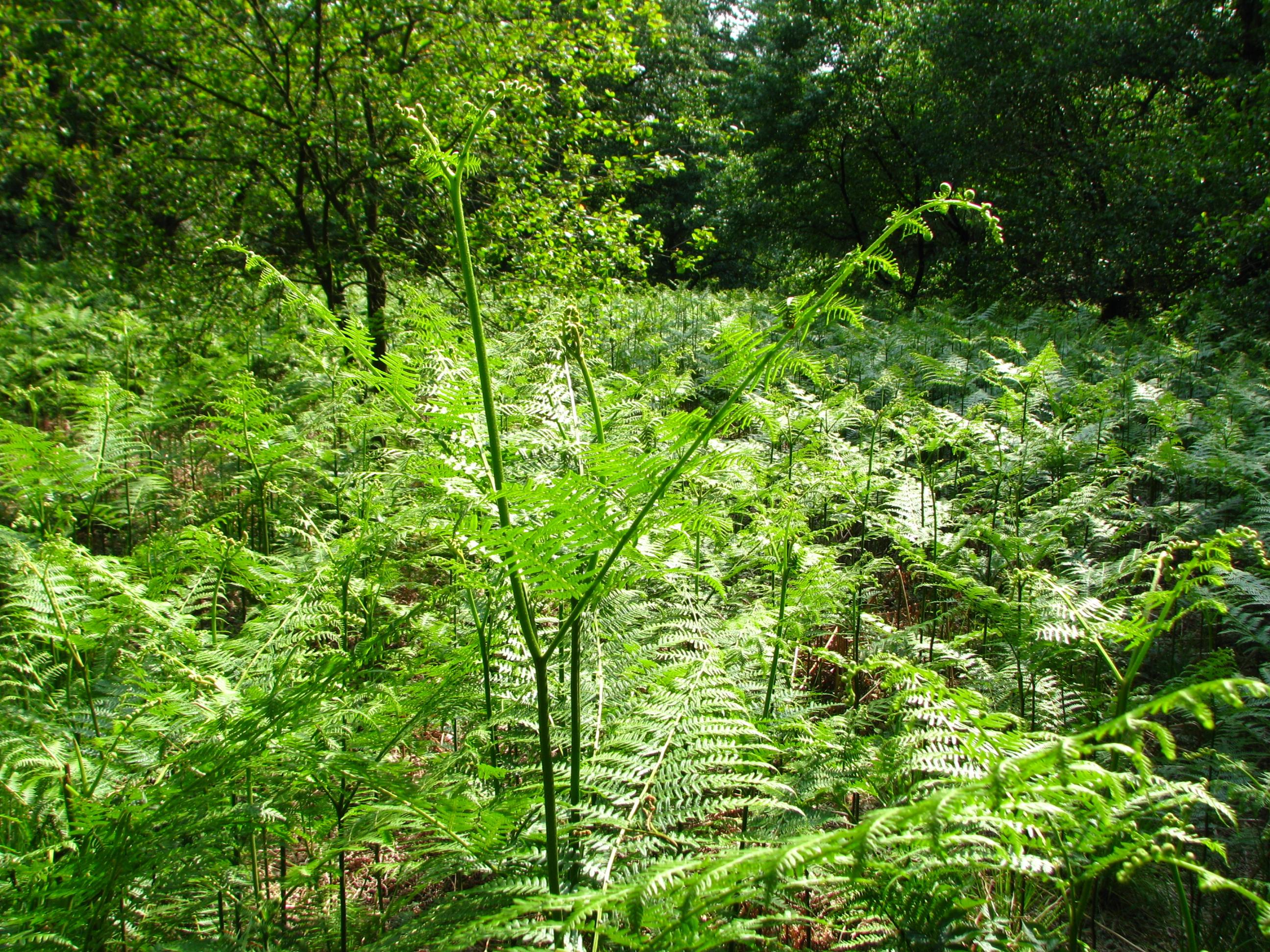 Adlerfarn in einer Lichtung des Urwalds Sababurg (Nordhessen).